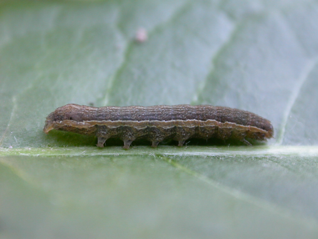 Diarsia rubi, larva (from eggs laid on 10 June 2005), Hellerup, Denmark, 28 June 2005